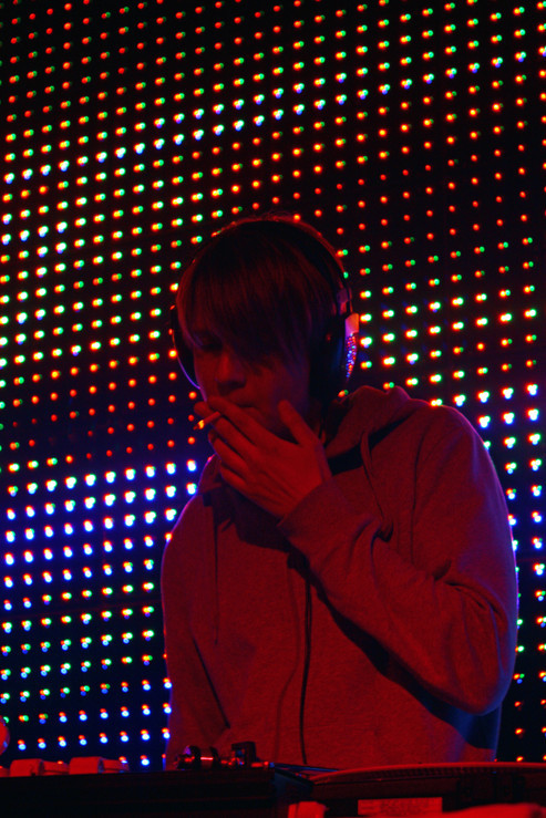 Комаров диджеет в Dub Club (Москва), апрель 2009